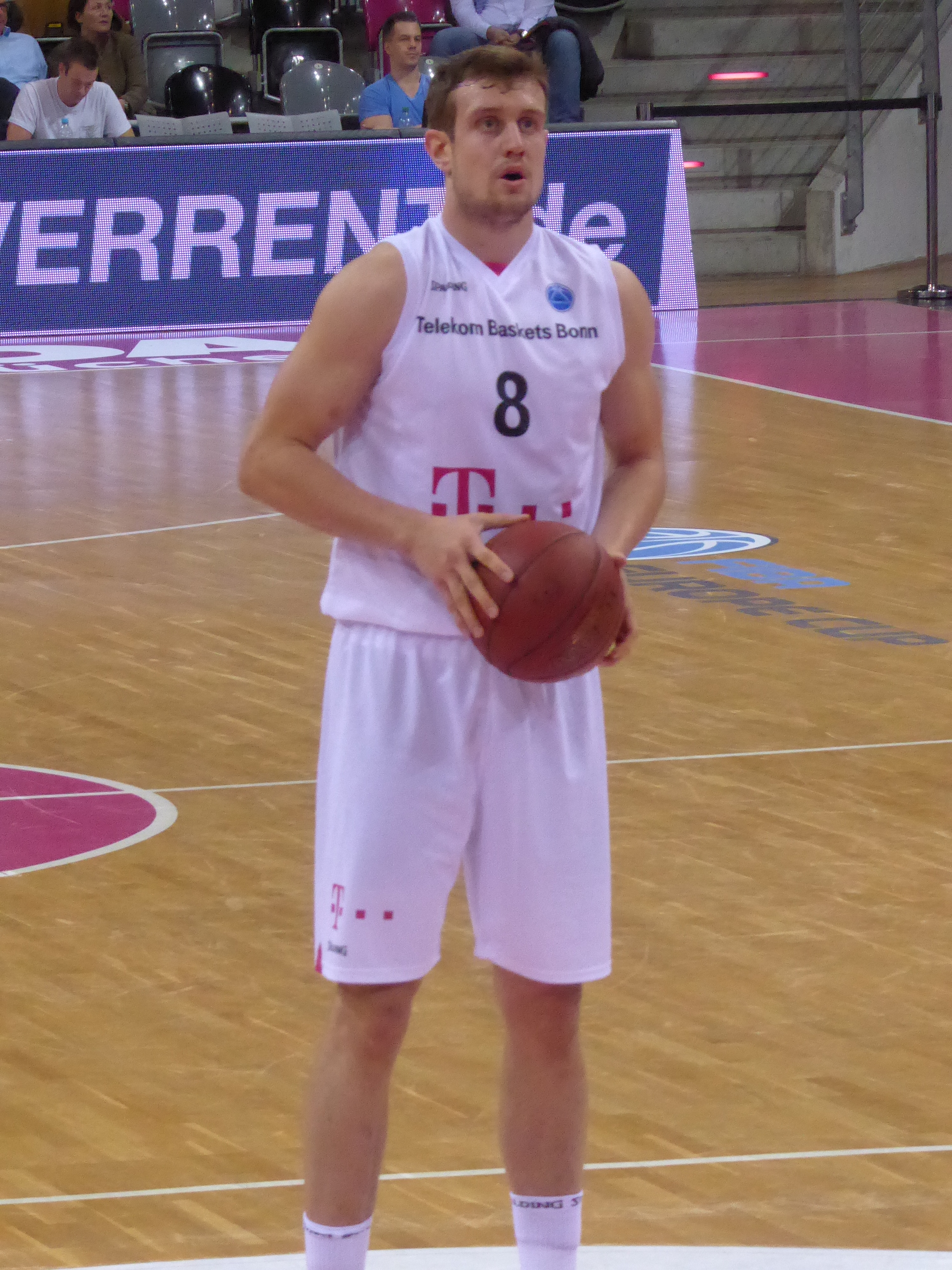 Johannes Richter beim Spiel der Telekom Baskets Bonn gegen die Södertälje Kings am 25. Oktober 2016.